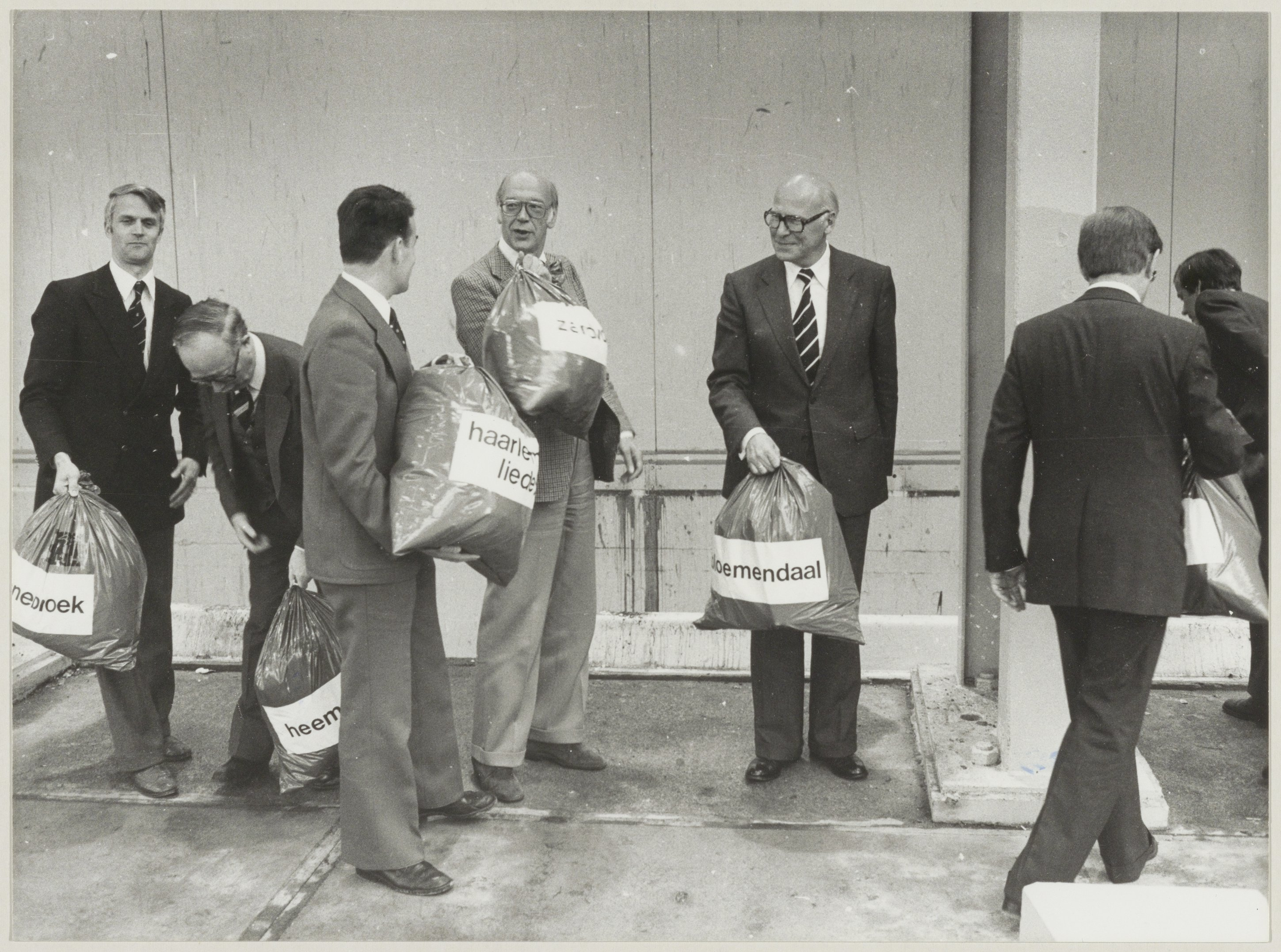 CollectieCollectie Fotoburo de BoerInventarisnummerNL-HlmNHA_54010962NL-HlmNHA_1478_18082kBeschrijvingDe burgemeesters de Widt (Bennebroek), van den Bosch (Heemstede), IJsselmuiden ( Haarlemmerliede), Machielsen (Zandvoort) en Weekhout (Bloemendaal) deponeren de eerste zakken vuilnis in het VAM-afvoerstation in de Waarderpolder.FotonummerNL-HlmNHA_1478_4493DocumenttypeHistorieprenten, tekeningen en foto'sVervaardigerBoer, Cees de (1918-1985) Soort vervaardigerFotograaf AnnotatiesJaarboek Ver. Haerlem 1979, blz. 181PersonenWidt, Johan (Hans) deBosch, jhr. mr. O.R. van denIJsselmuiden, Drs. F.J.A.Machielsen, H.Weekhout, G H Functies personenburgemeester LandNederland ProvincieNoord-Holland GemeenteHaarlem PlaatsHaarlem StraatJan van Krimpenweg Begindatum16-06-1979Einddatum16-06-1979TechniekFoto Trefwoordenbedrijven, bestuur en politiek